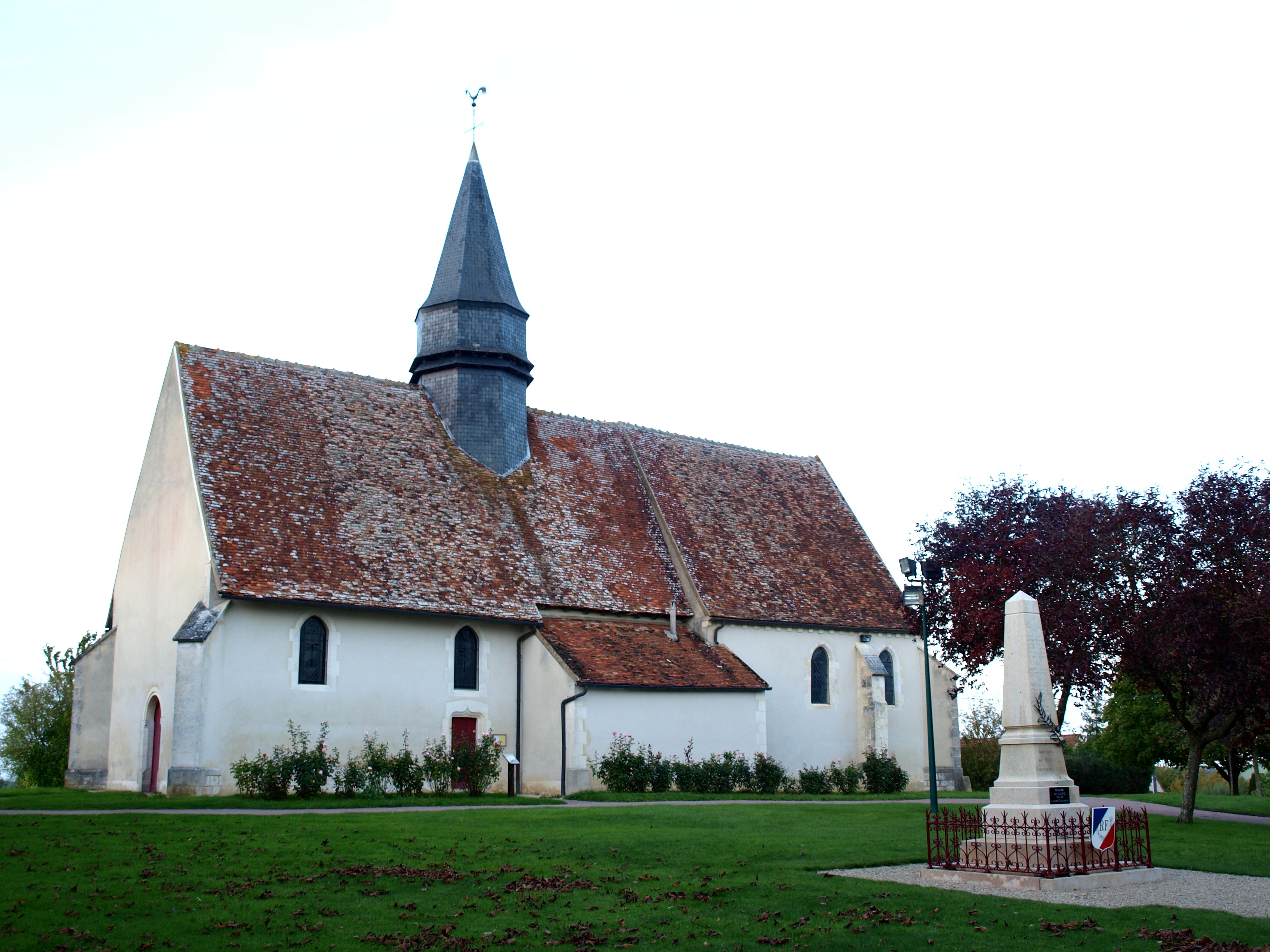 Beauvoir (Yonne, France) ; église